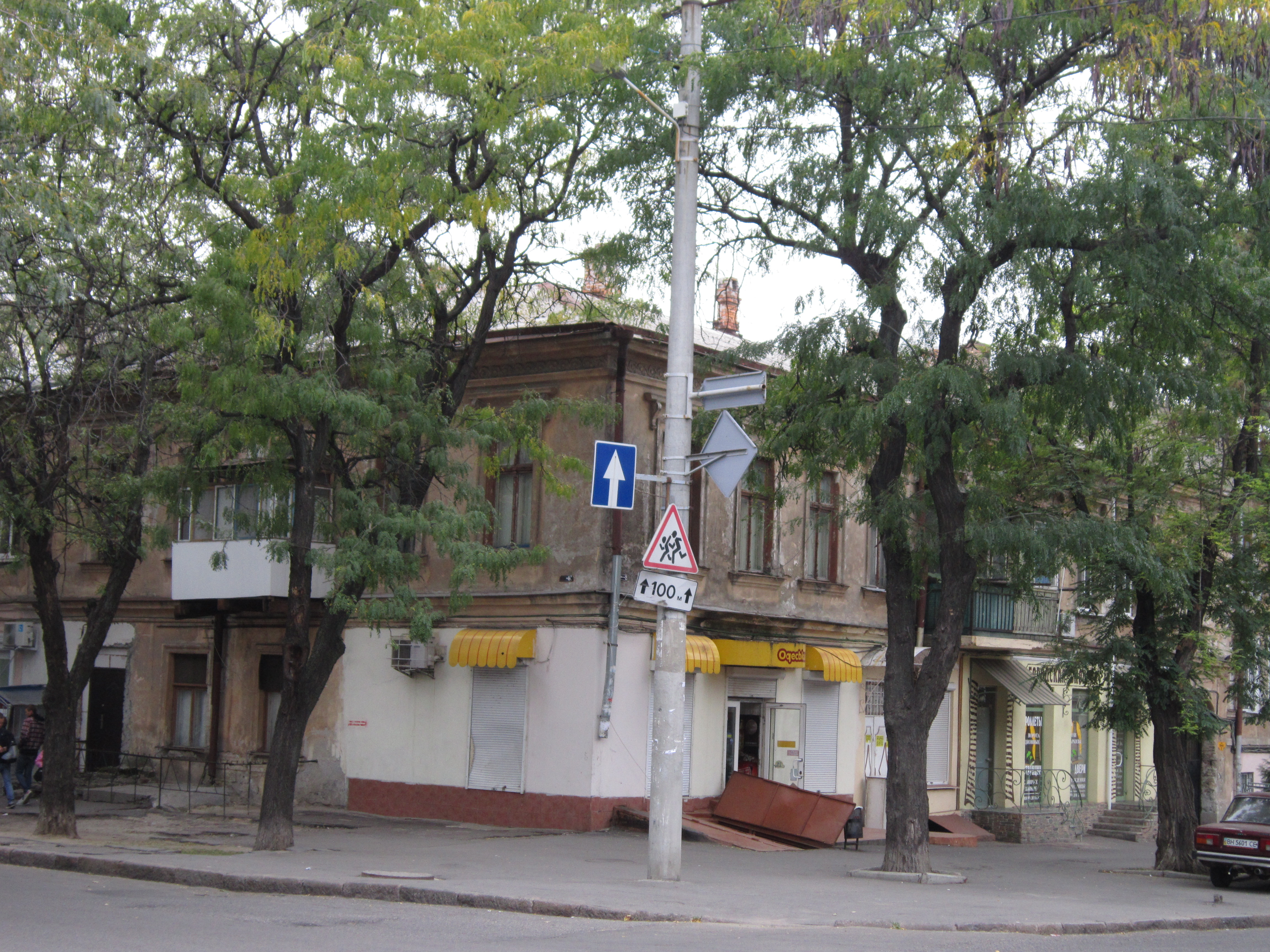 Будинок, в якому жили:- П.І. Ніщинський - український композитор і поет-перекладач;- М.М. Аркас - композитор, Одеса, Ніжинська вул., 14